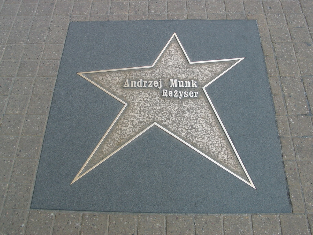 Łódź Walk of Fame - Andrzej Munk